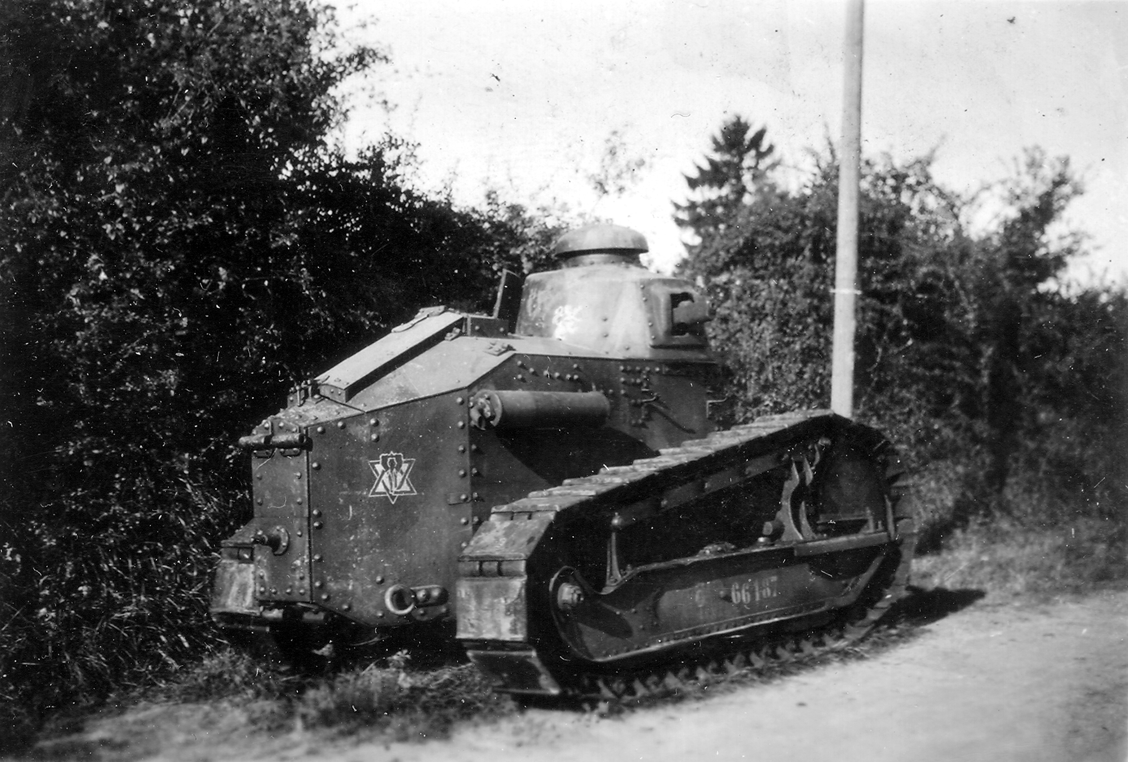 Photographie allemande - (col. Normandie Mémoire) Un char abandonné le long d'une haie sur le bord d'une route, il s'agit d'un FT-31 (ou char FT "mitrailleuse") Renault n°66187 ex FT-17 rééquipé avec une mitrailleuse modèle 1931 Reibel de 7,5mm (en 1931, les FT 17 mitrailleuses sont modifiés par l'arsenal de Rueil.) un lion rampant est peint sur la tourelle et sur l'arrière l'insigne du 66ème BCC (Bataillon de Chars de Combat) Hors le 66e BCC est en 1940 au Maroc. A Casablanca avec 2 sections soit 6 FT17/31 et à Marrakech avec 2 sections soit 6 FT17/31. Il appartient au GBCC (Groupe de Bataillon de Chars de Combat) 522 formé le 2 sept 1939 au Maroc avec les 62e BCC et 66e BCC. Dans le JMO (Journal de Marche et d'opérations) du 66e BCC, nulle mention d'un détachement vers la France. Mystère ? Reportage de 3 photos : p003069, p003070 et p003071 (File:P003069 Renault FT mod 31 n°66187 near Lisieux, June 1940.jpg, File:P003070 Renault FT mod 31 n°66187 near Lisieux, June 1940.jpg et File:P003071 Renault FT mod 31 n°66187 near Lisieux, June 1940.jpg)